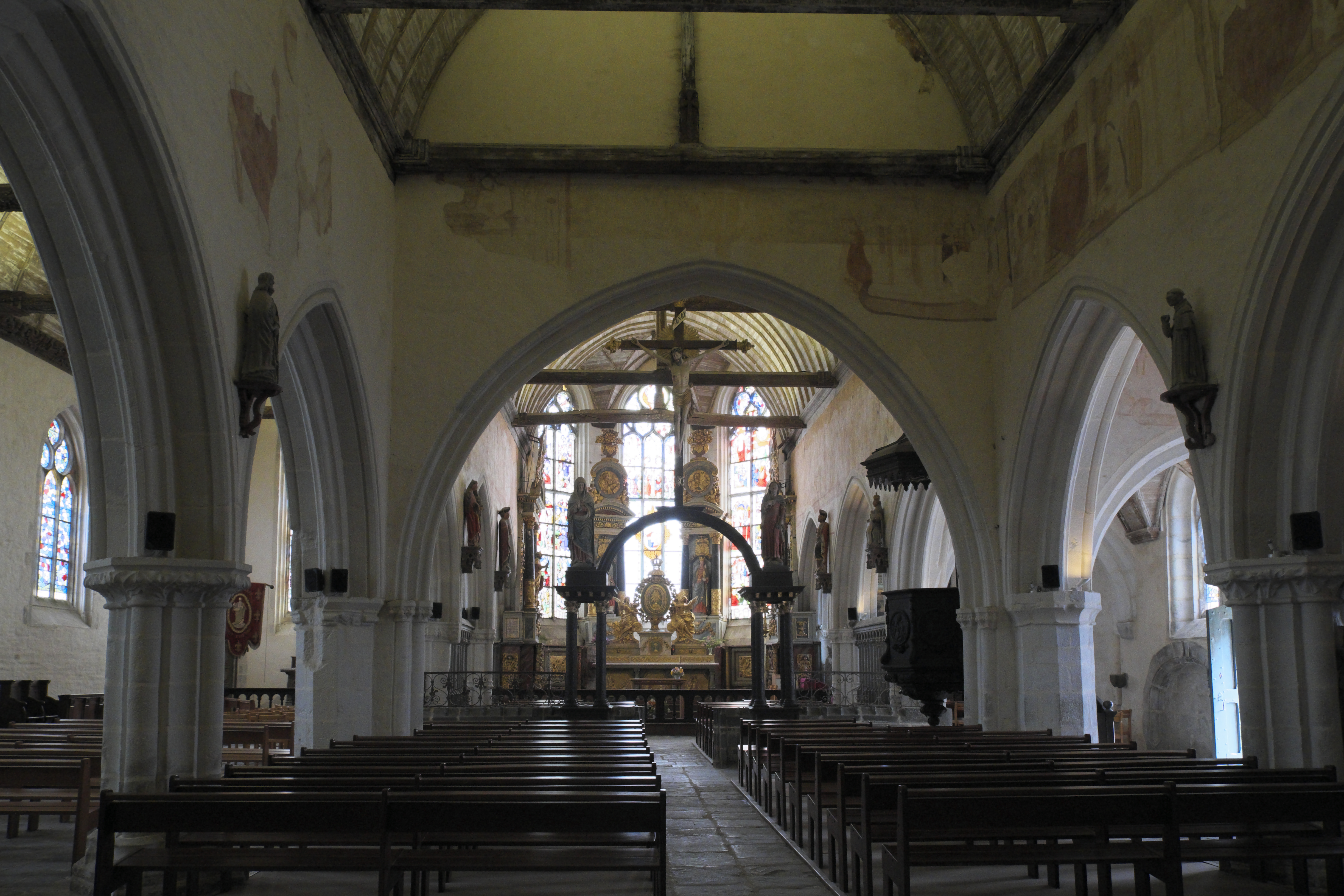 Katholische Pfarrkirche Saint-Salomon in La Martyre im Département Finistère (Region Bretagne/Frankreich), Innenraum